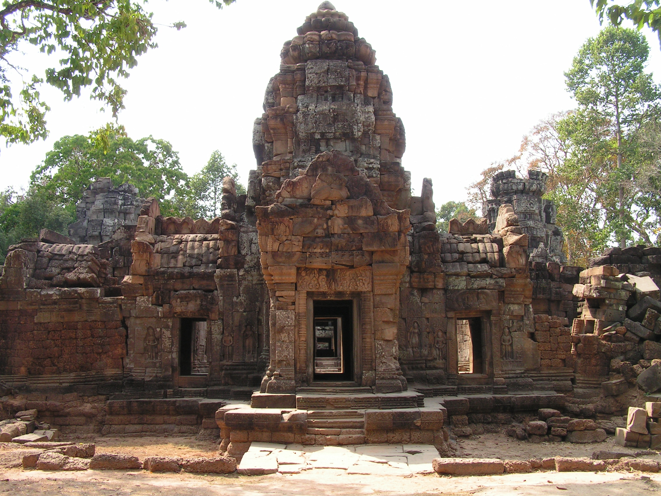 Small Prang temple Ta Som at Angkor